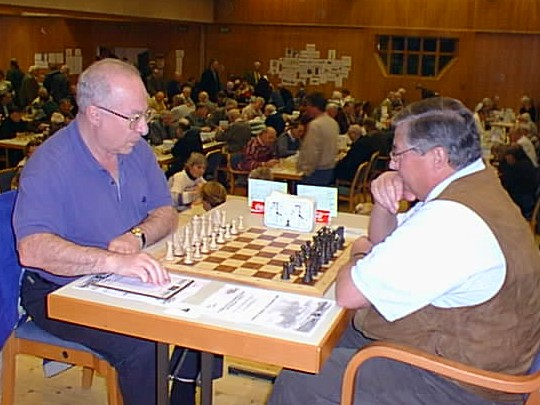 Anatoly Lein - Harald Lieb, 6. Runde der 8. Weltmeisterschaft der Senioren 1998 in Grieskirchen (Brett 4 von 98 mit Spielsaal im Hintergrund am 15. November).